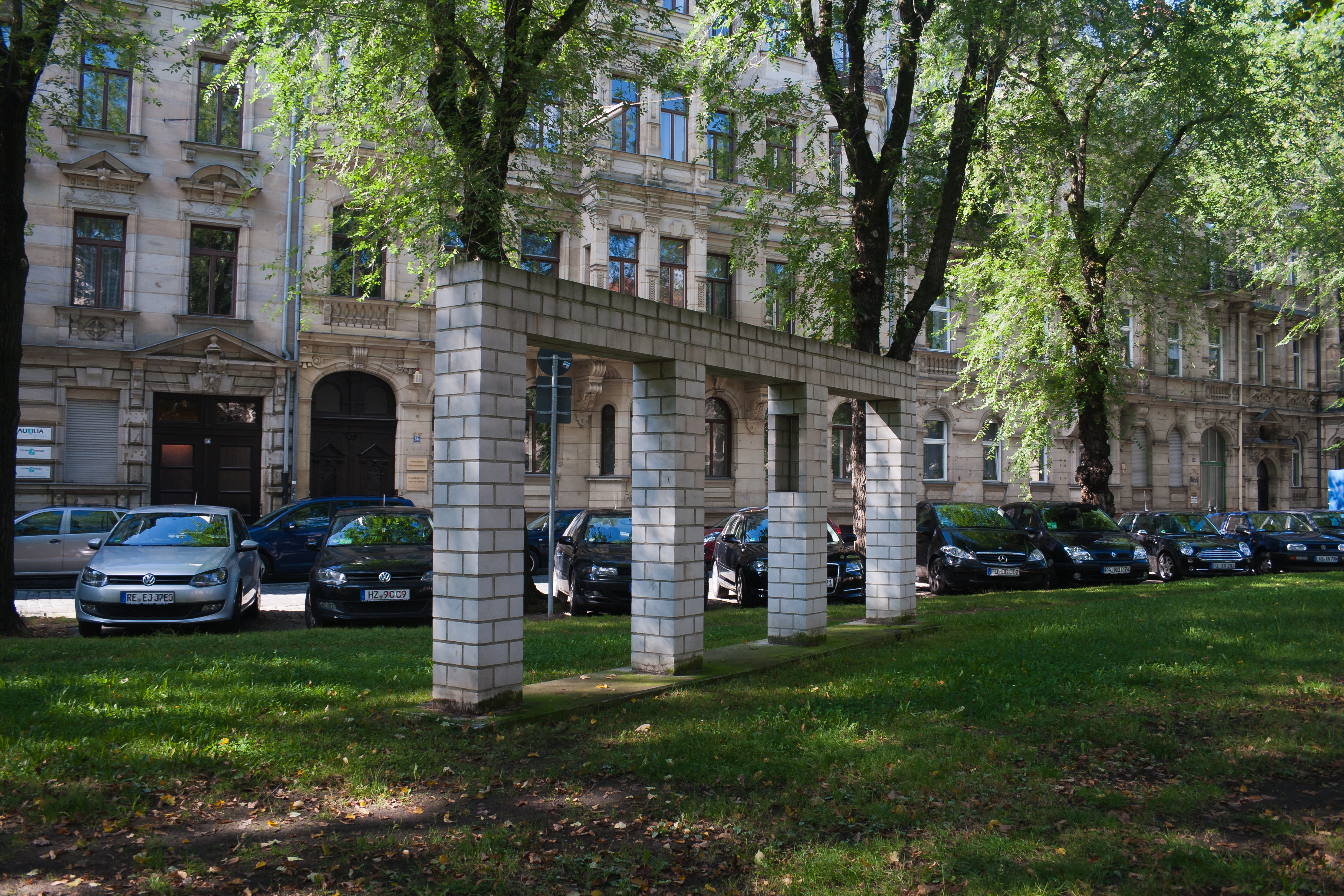 Fürth, Bavaria, Germany